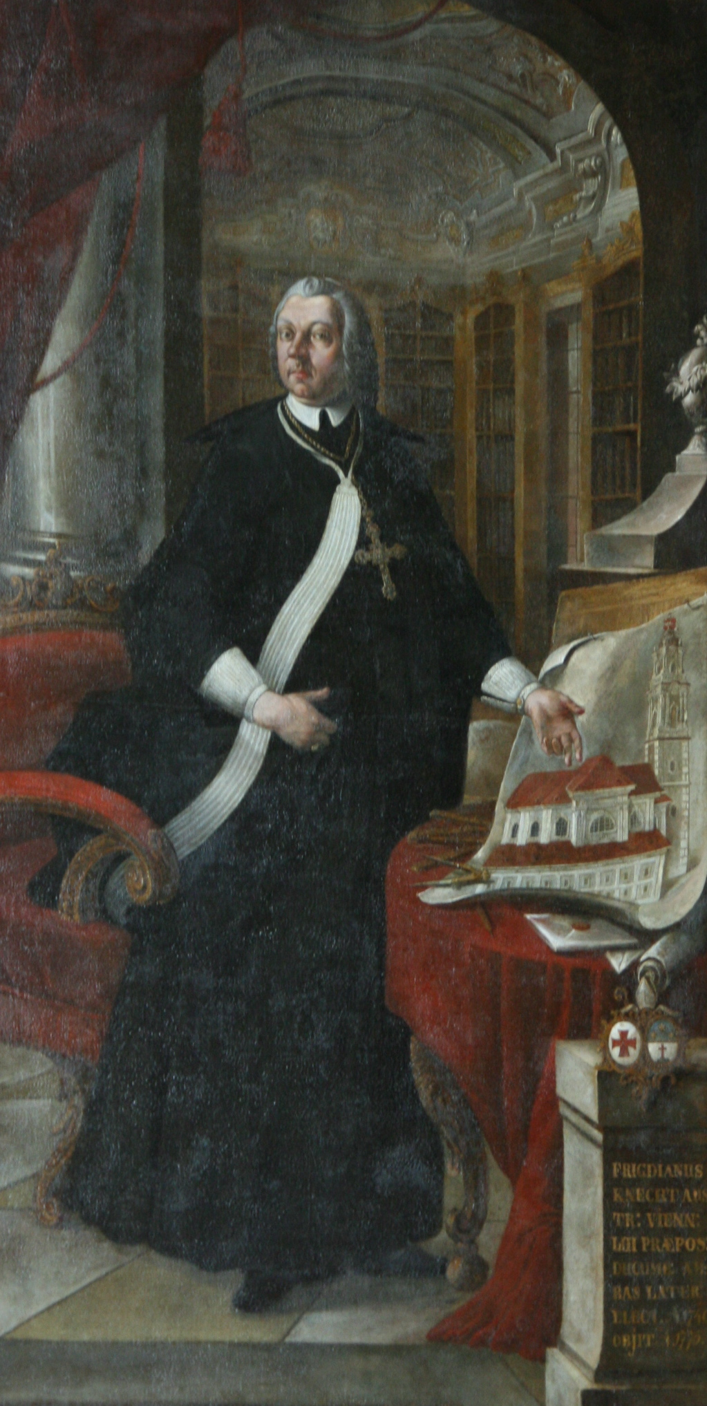 Propst Frigdian Knecht von Stift Herzogenburg, gilt als einer der wichtigsten Bauherren seines Siftes während der Barockzeit. Das Gemälde hängt im Festsaal von Stift Herzogenburg.